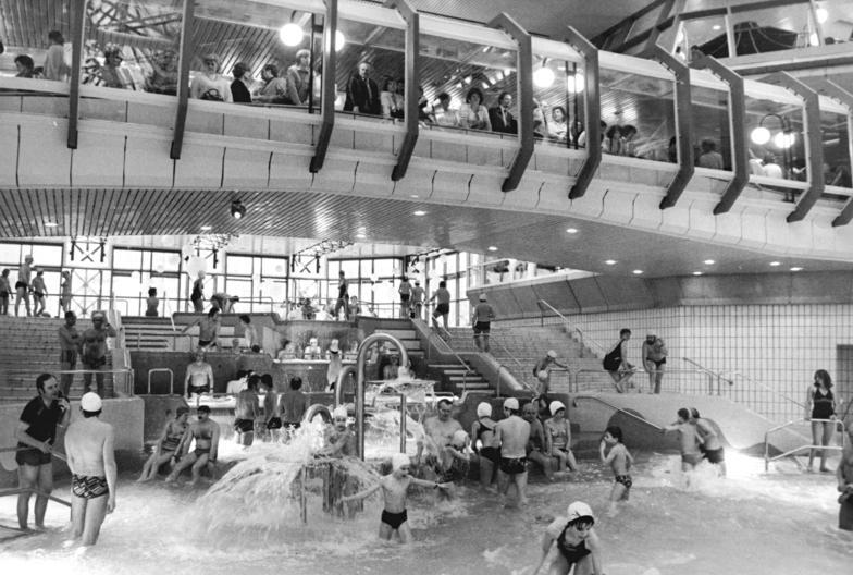 ADN-ZB Link 18.3.81 Berlin: Das Sport- und Erholungszentrum in der Leninallee wurde am 20.3.81 eröffnet und von der Bevölkerung in Besitz genommen. Blick von unten auf die Wasserkaskaden in der Schwimmhalle.